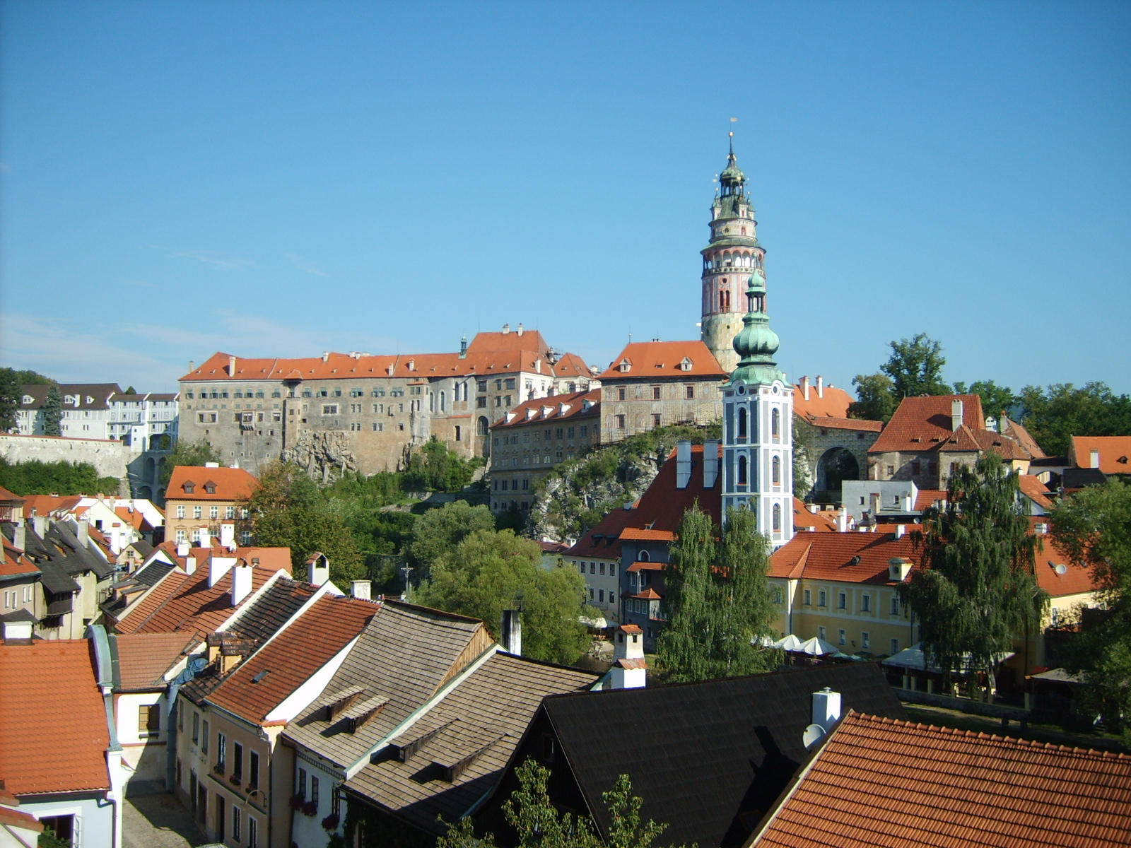 Castle in Český Krumlov, Czech rep.